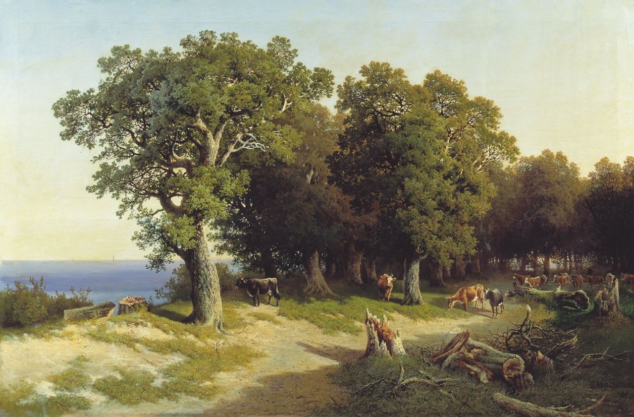 Дубовы гай ў Сестрарэцку